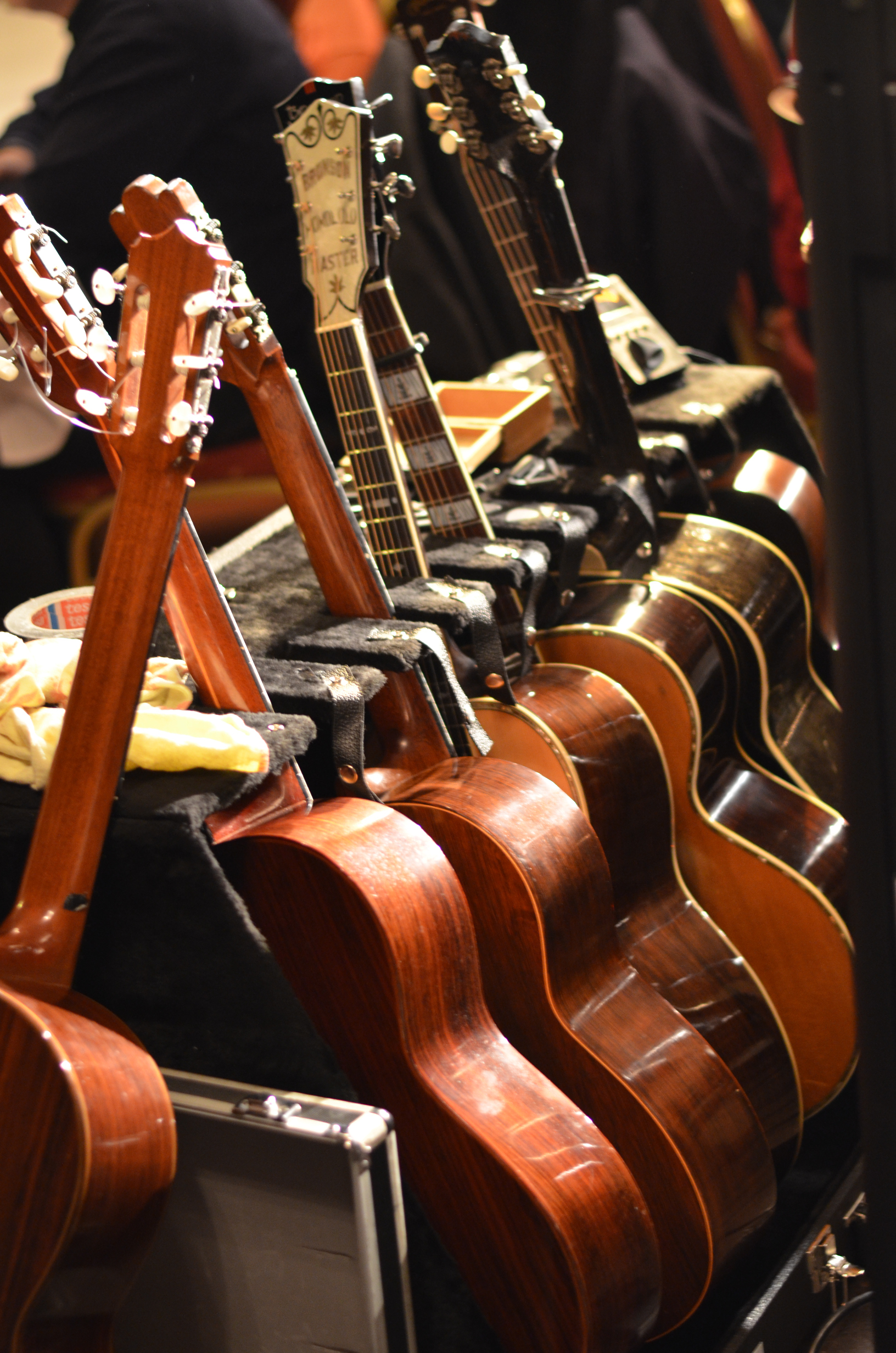 Konzert von Michael Fitz, 2012 in Lüdinghausen hier sieben der acht mitgeführten Gitarren